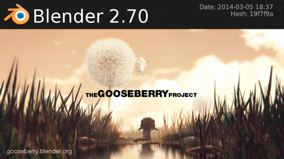 Blender 2.70 Splash Blender Foundation - Blender